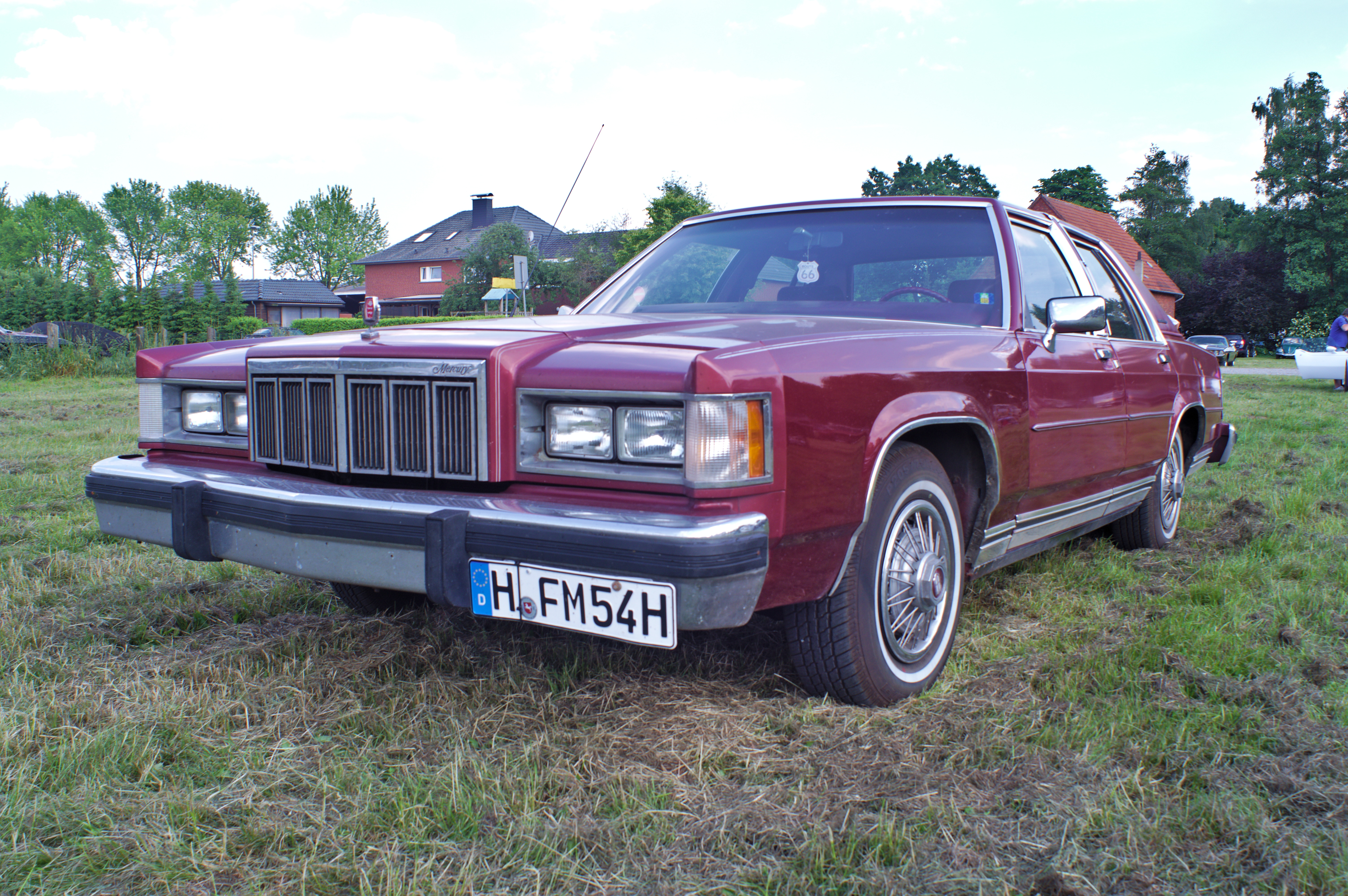 Strassenkreuzer Treffen Kaunitz 2018